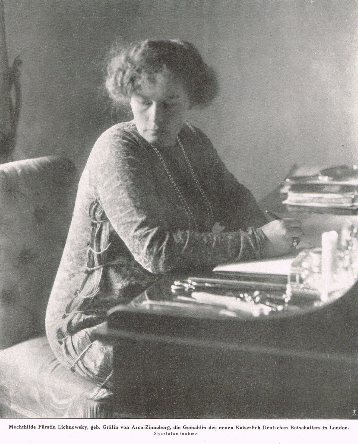 Mechthilde Fürstin Lichnowsky 1912